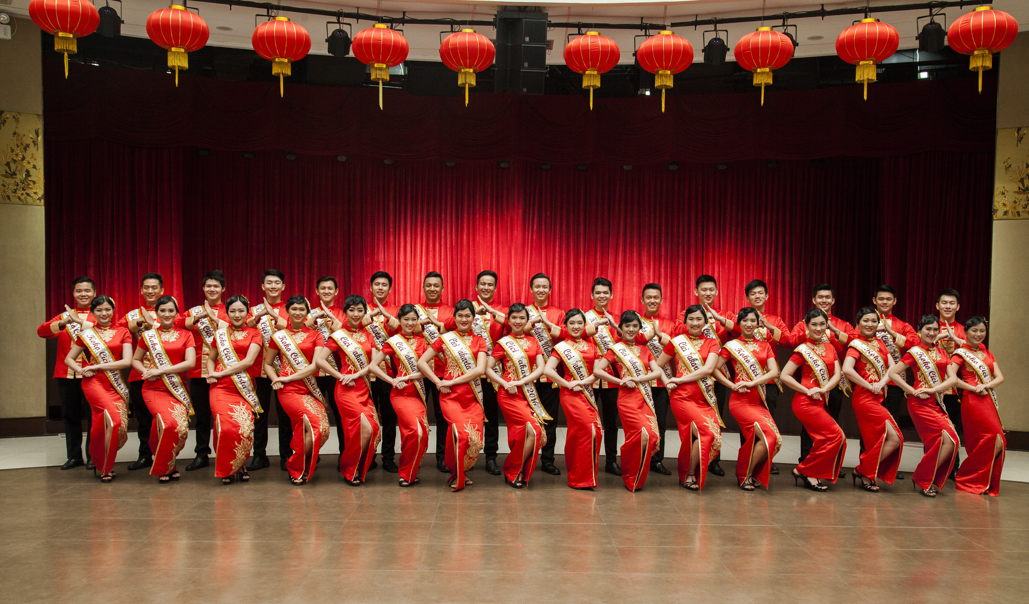 Koko Cici Jakarta 2016 at Museum Hakka, Taman Budaya Tionghoa